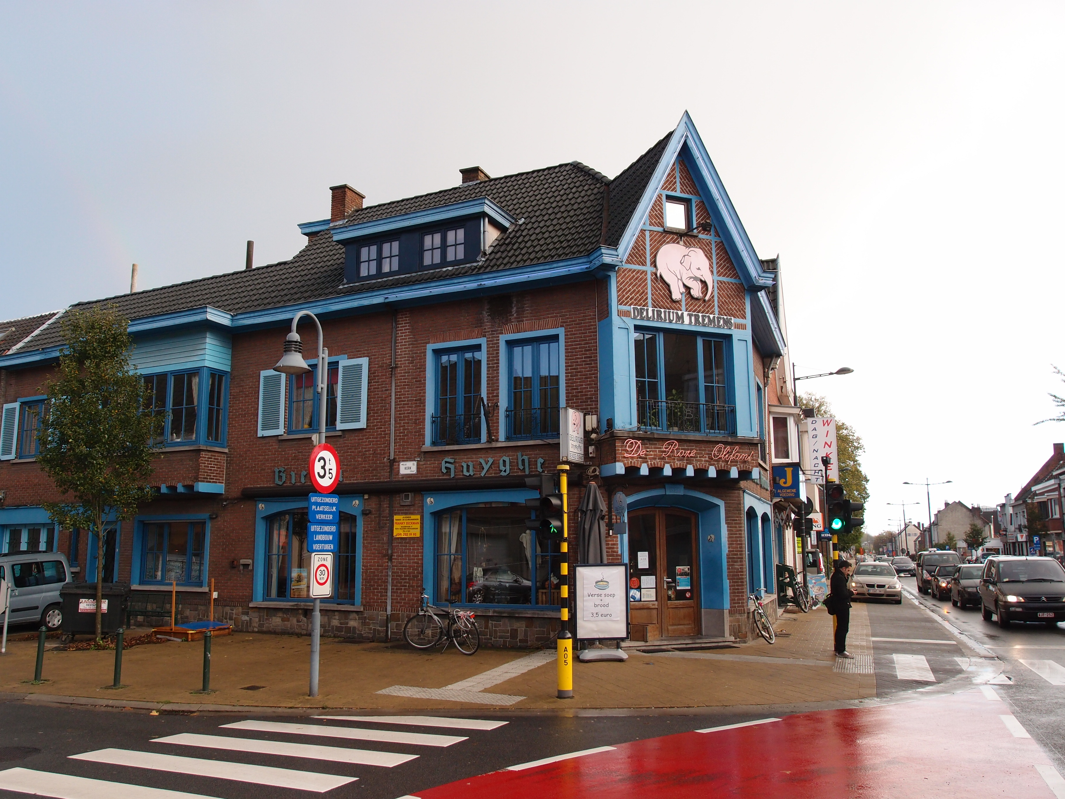 Gaststätte mit Delirium tremens Werbung in Melle / Belgien Datum: 10.11.2013 Urheber: M. Pfeiffer alias Benutzer:Gordito1869 Quelle: privates Fotoarchiv des Urhebers